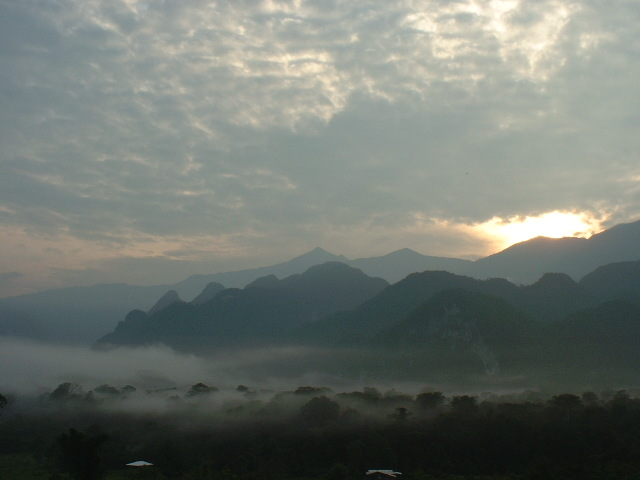 ムル国立公園の画像中央の大きい山がグヌン・ムル2004年10月12日、Juanitaが旅行したときに撮影